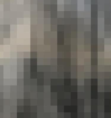 פיקסליזציה משתמש אפי ב.